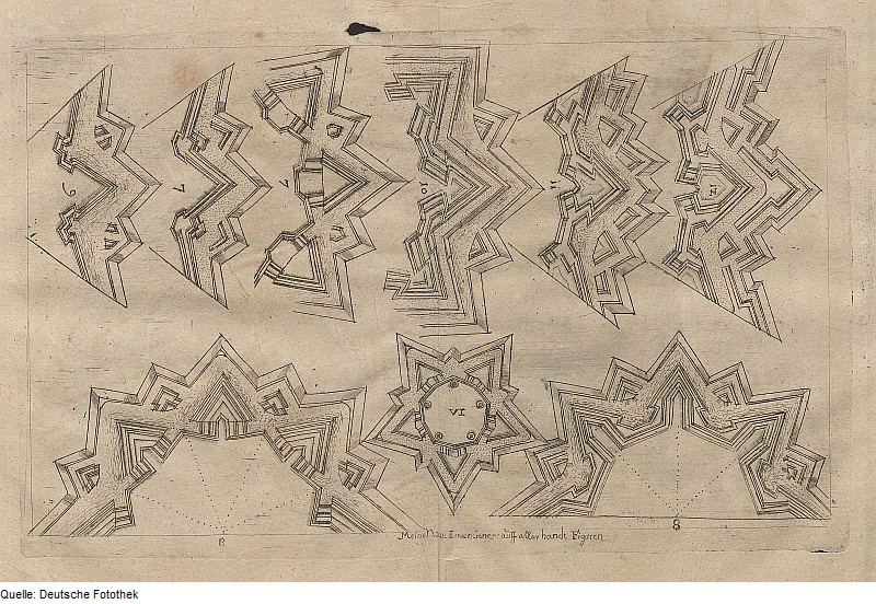 Original image description from the Deutsche Fotothek Architektur & Festungsbau & Bastion & Redan & Flesche & Ravelin & Face & Flanke & Flankierung & Contregarde & Grabenschere